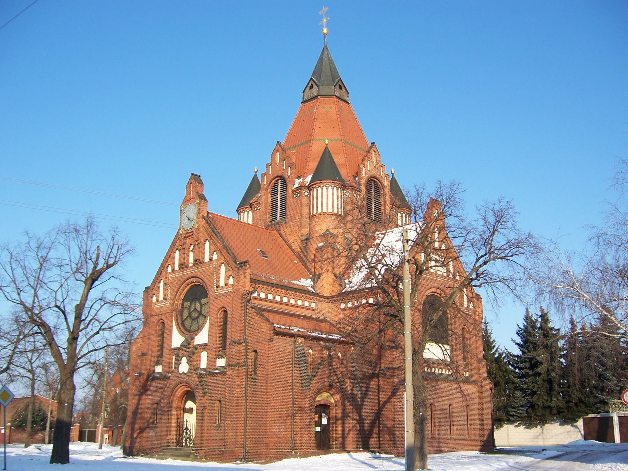 Die Philipp-Melanchthon-Kirche in Dessau-Alten (Baudenkmal im Denkmalverzeichniss Sachsen-Anhalt, Erfassungsnummer: 094 40935 000 000 000 000 [1])